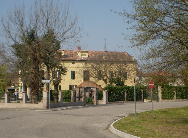 Edificio storico frazione Pontegradella -Ferrara- Italia